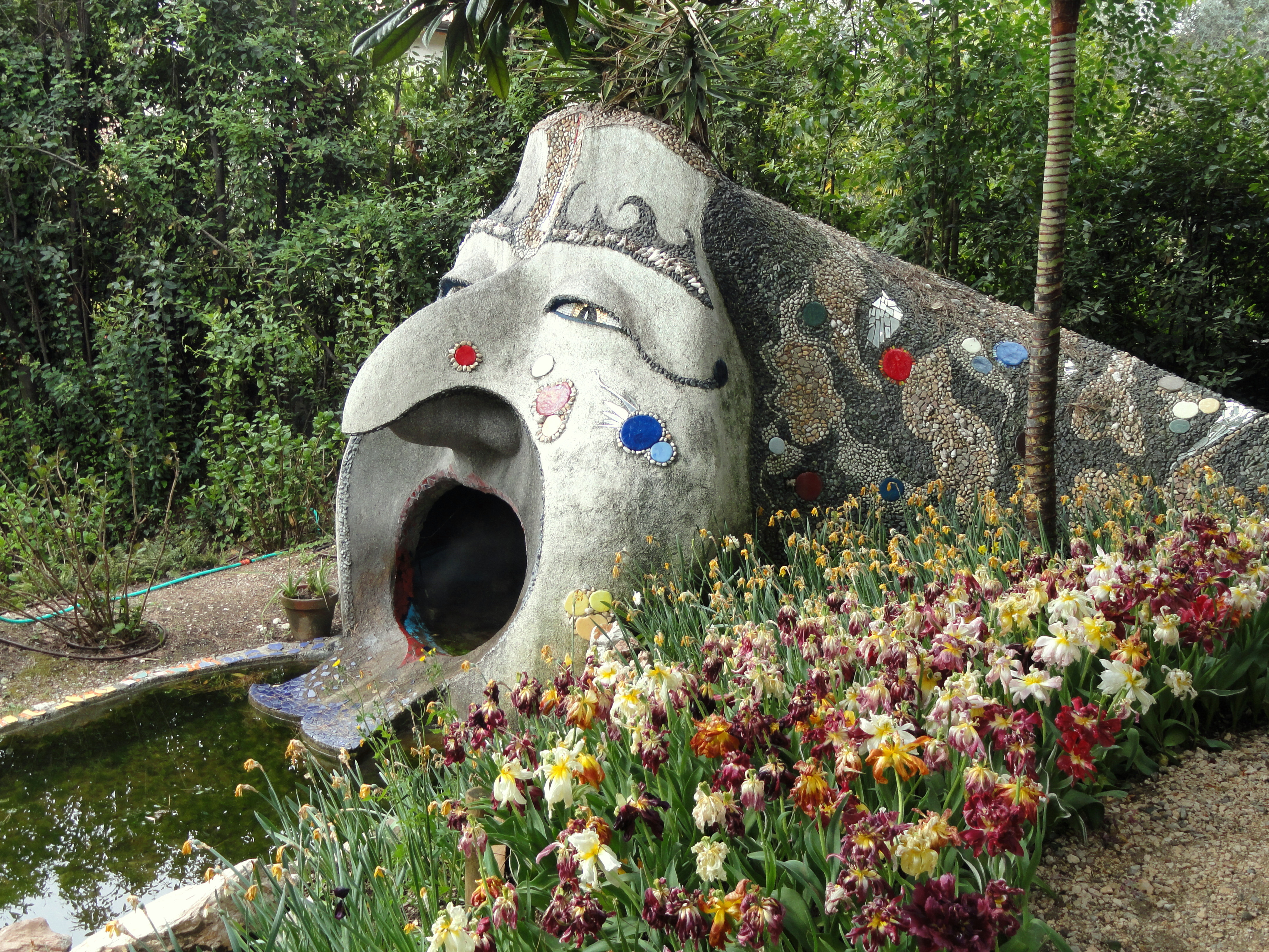 Giardino Botanico Fondazione André Heller, in Gardone Riviera, on Lake Garda, Brescia, Italy.